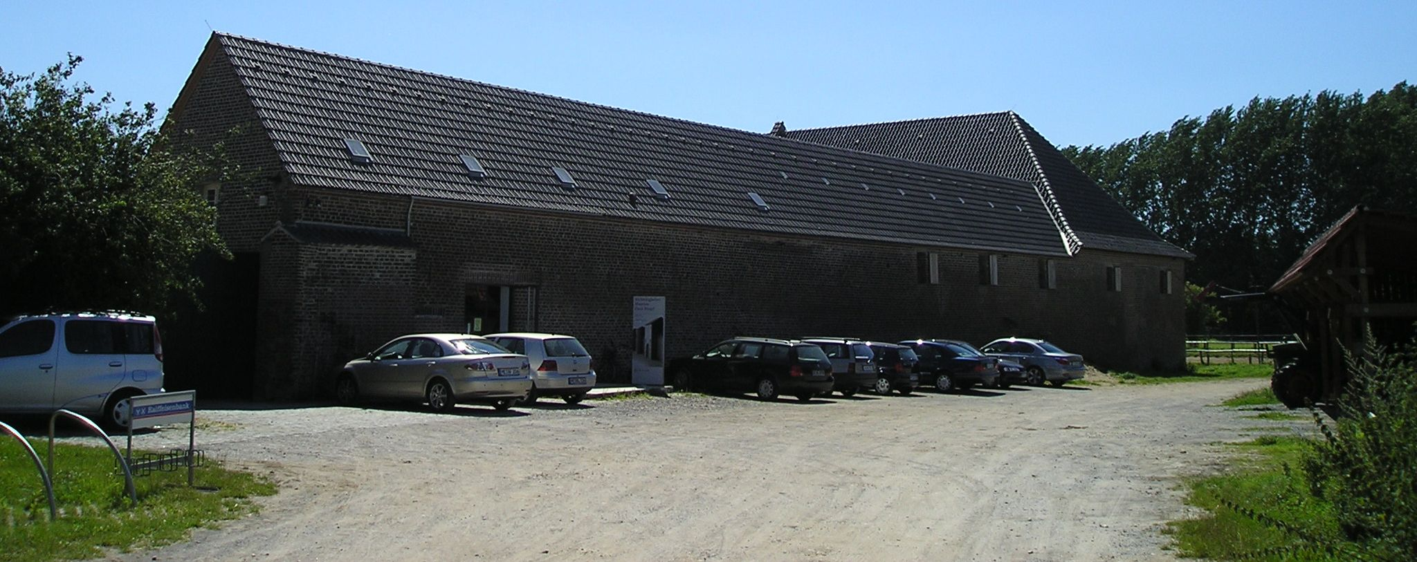 Archäologisches Museum Haus Bürgel in Monheim-Baumberg